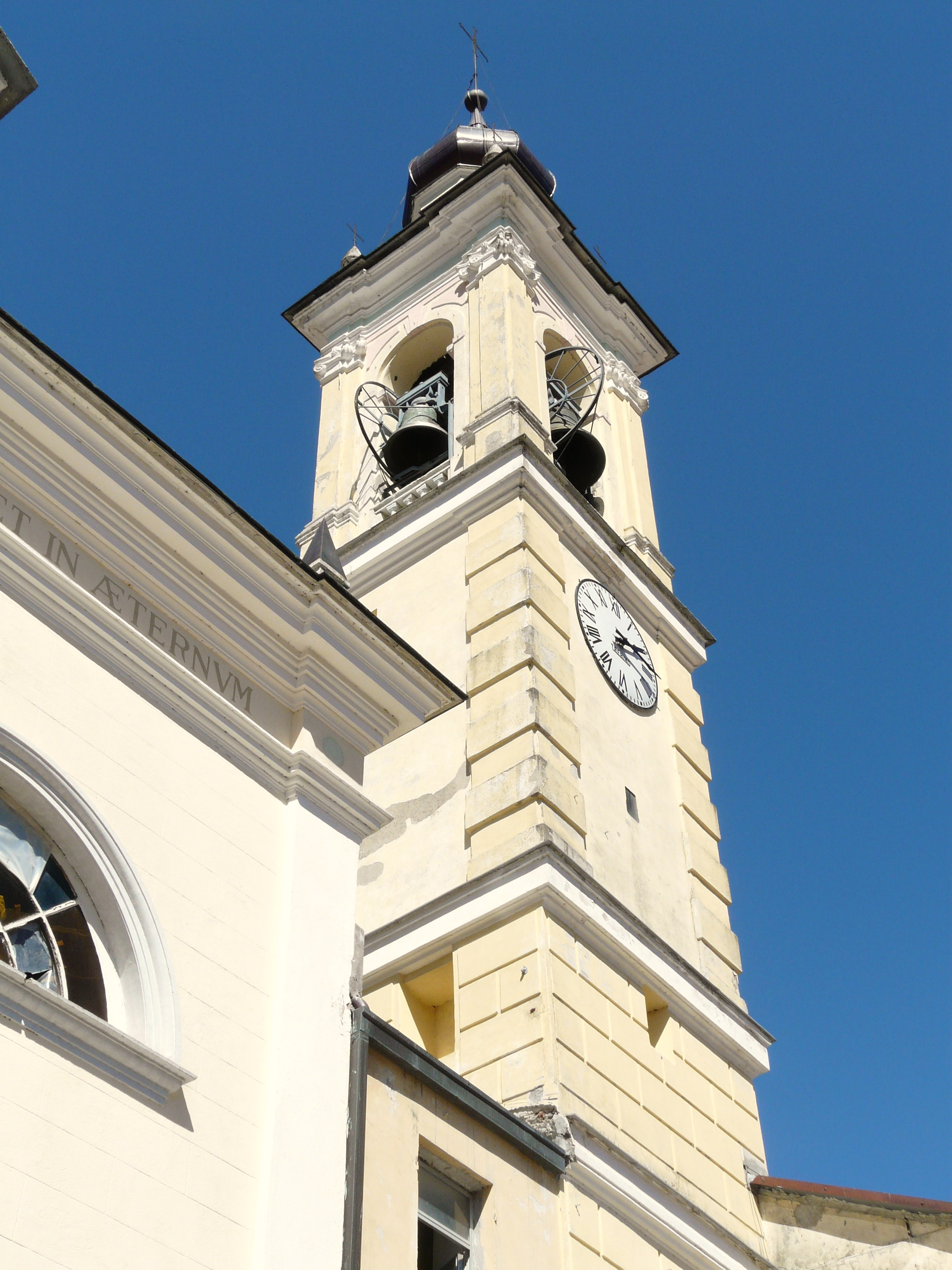 Chiesa di San Giovanni Decollato, Montoggio, Liguria, Italia